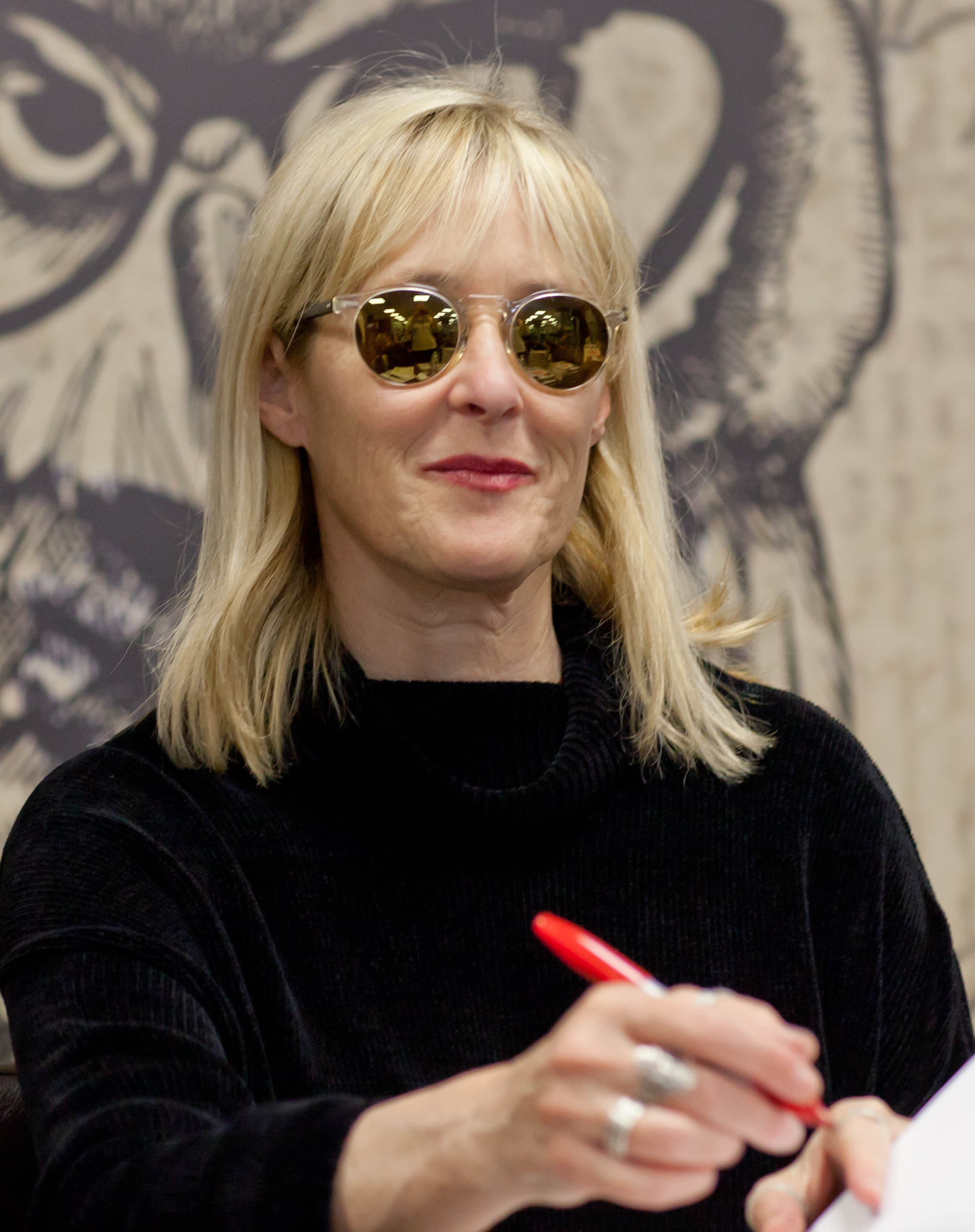 Джоанна и Мэдисон Стингрей на презентации книги "Стингрей в стране чудес" в Московском доме книги на Новом Арбате